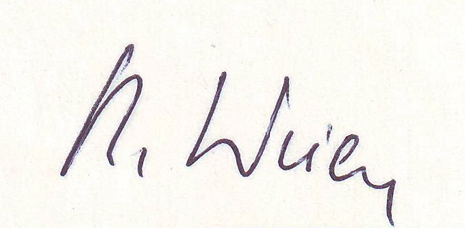 Unterschrift Rudolf Weiler, Oktober 1978